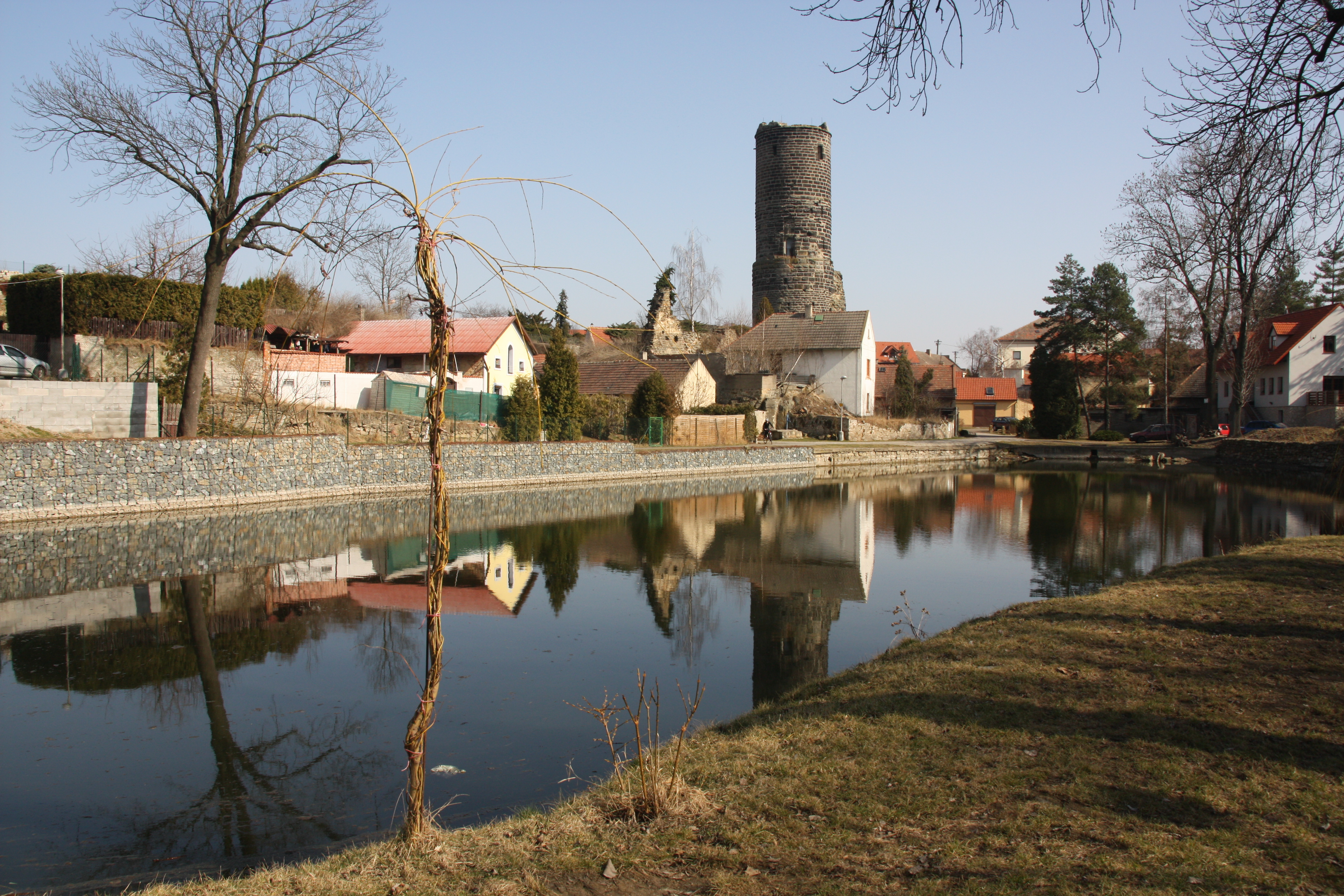 Hradní zřícenina Jenštejn